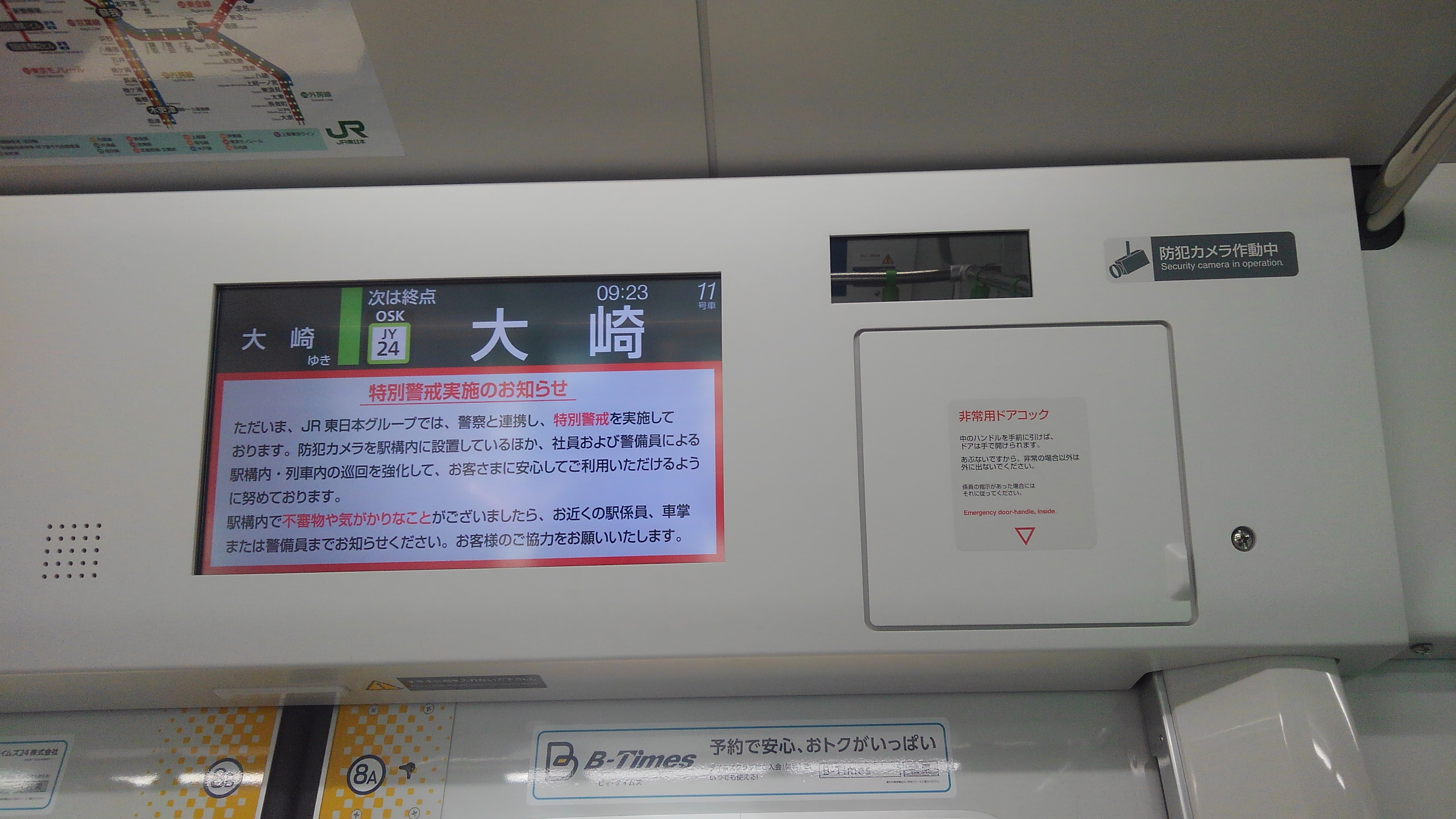 E235系（クハE235-19）車内の防犯カメラ。